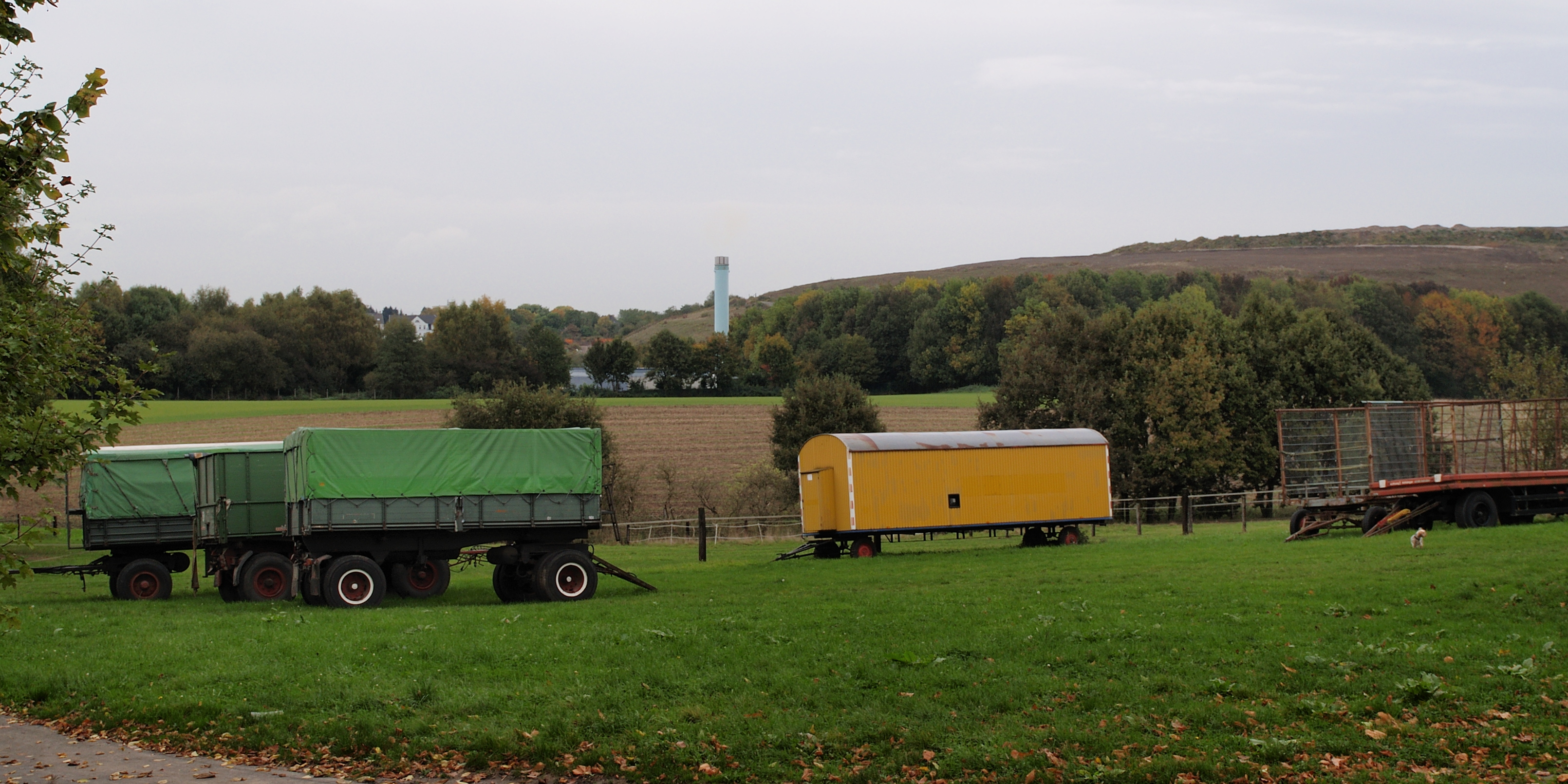 Mülldeponie Bochum Kornharpen, mit Schornstein des Deponiegaskraftwerkes